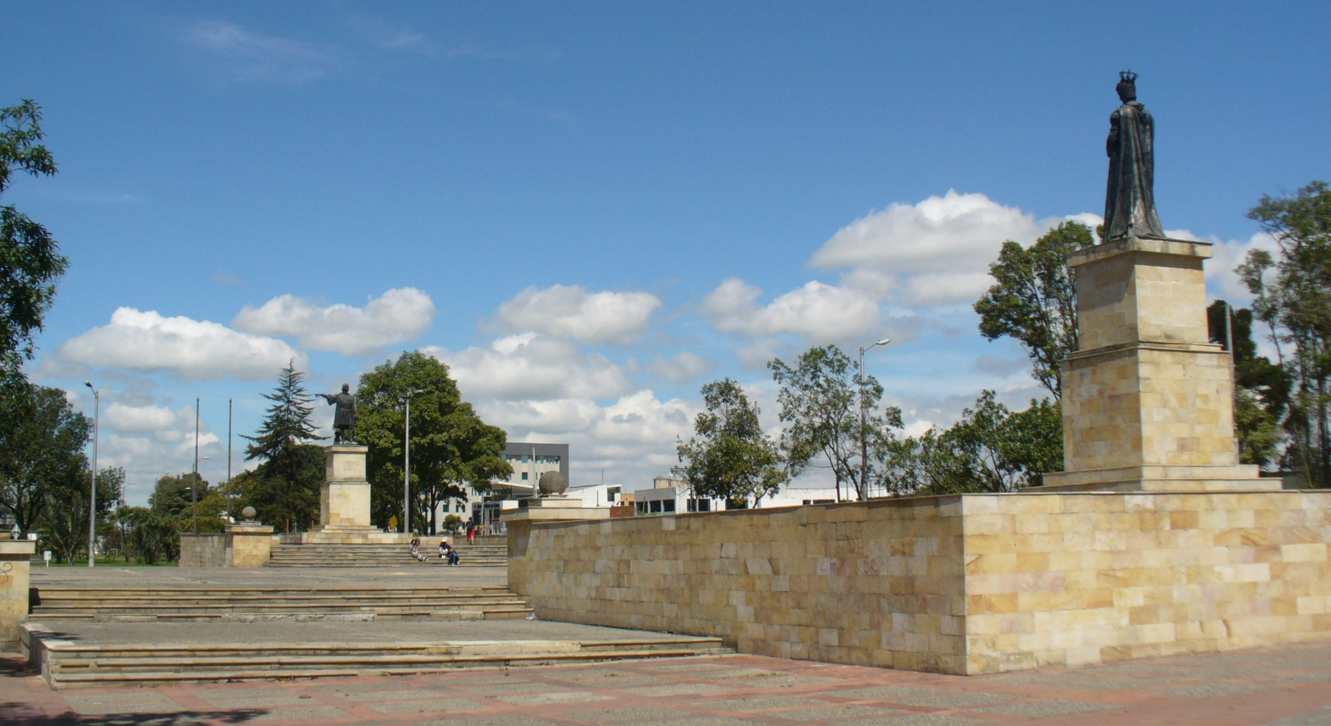 Monumento a Colón en Bogotá